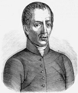 Pray György (1723–1801) történetíró, apátkanonok (Vasárnapi Ujság, 1859. szeptember 11.)